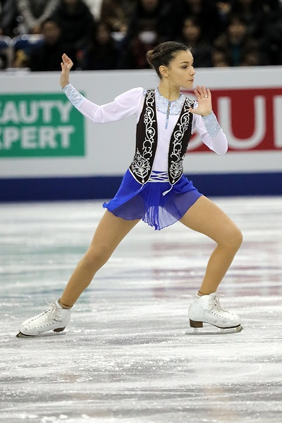 Софья Самодурова (Россия) на финале юниорского Гран-при 2017-2018